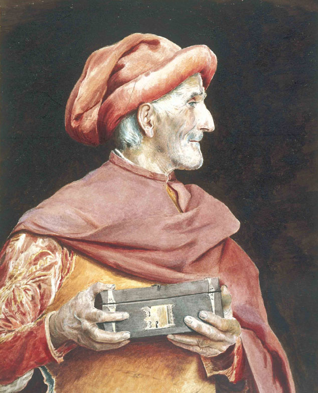 Miser. Water-colour on paper Великая княгиня Мария Федоровна Скряга. 1890 Бумага, акварель лист: 36,5 26 изображение: 46 39,5 Великая княгиня Мария Федоровна. Скряга. 1890. Бумага, акварель. лист: 36,5 26. изображение: 46 39,5. Музей изобразительных искусств Республики Карелия г. Петрозаводск Г-94